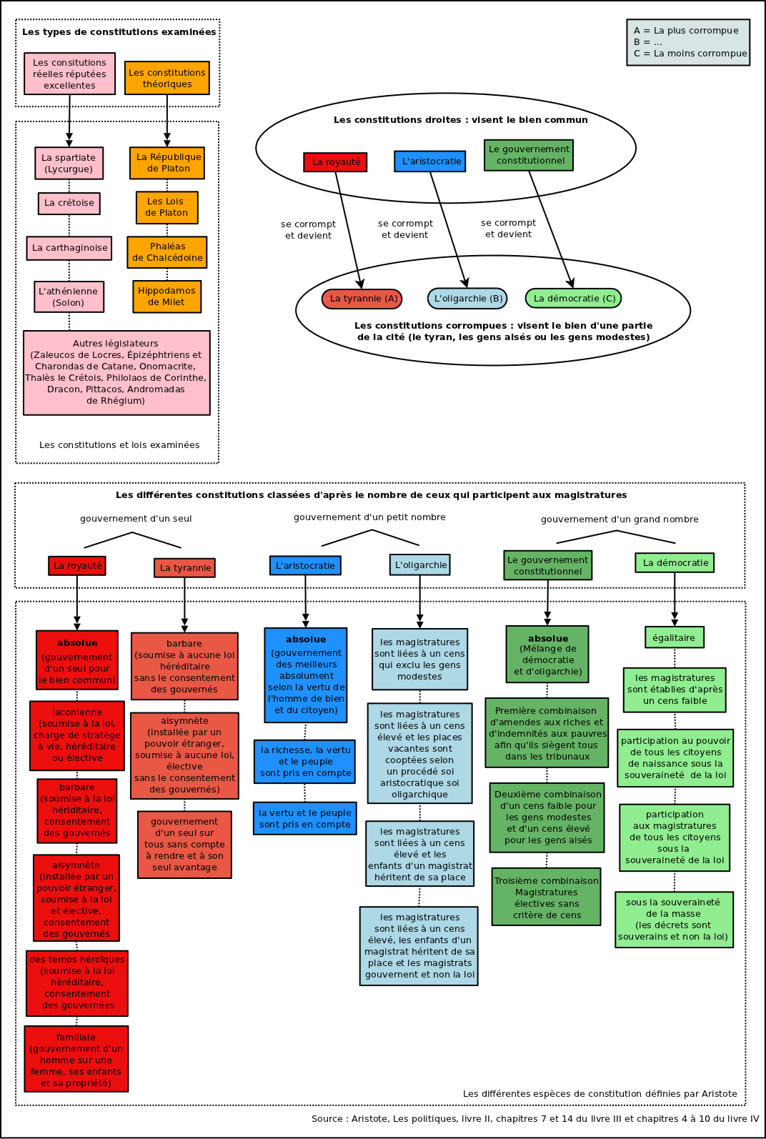 Diagramme illustrant la classification faîte par Aristote de diverses constitutions, réelles et théoriques, examinées par son école philosophique.